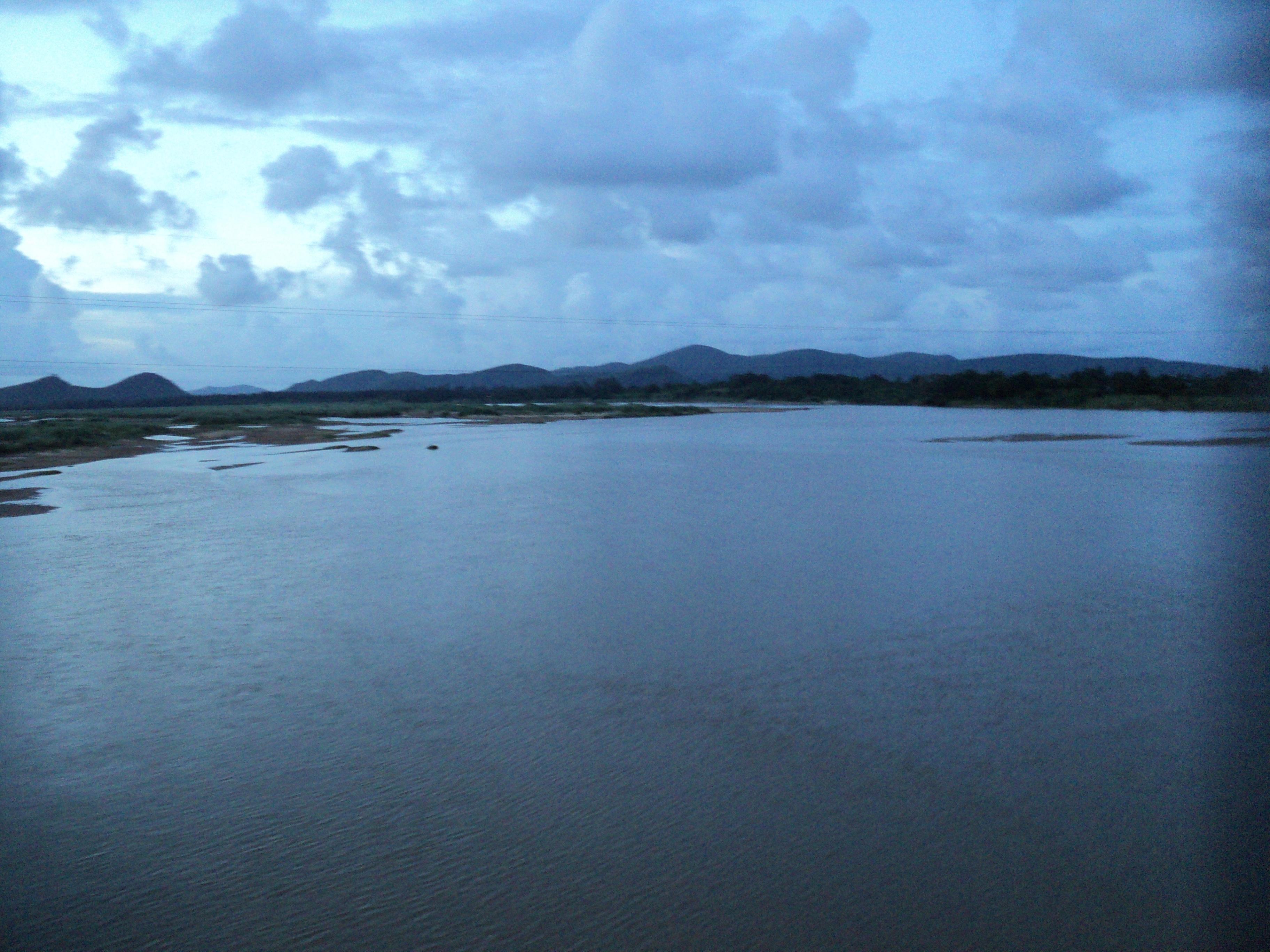 Rushikalya River